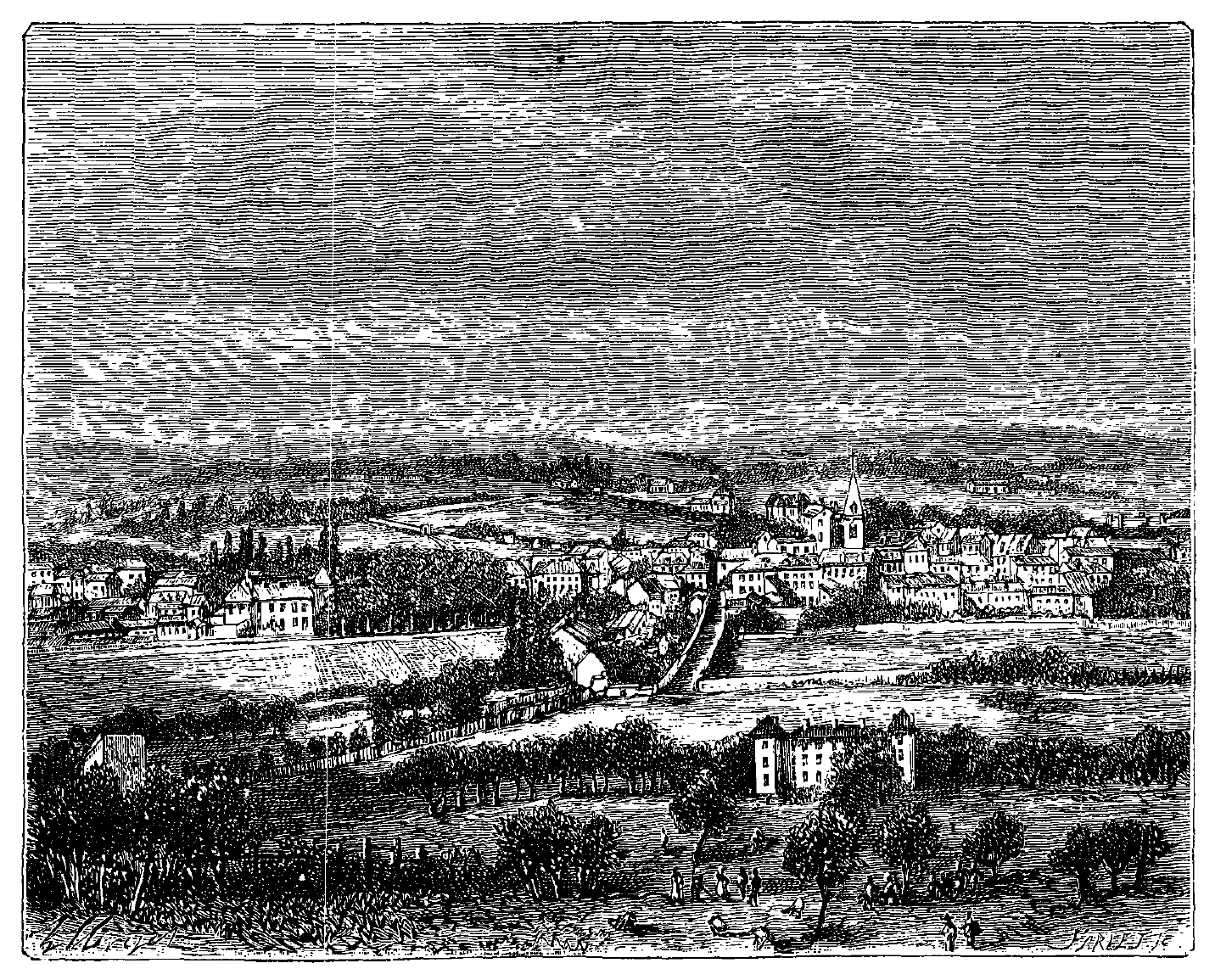 extrait de La France illustrée, géographie, histoire, administration, statistique, etc., tome I, par V.-A. Malte-Brun.